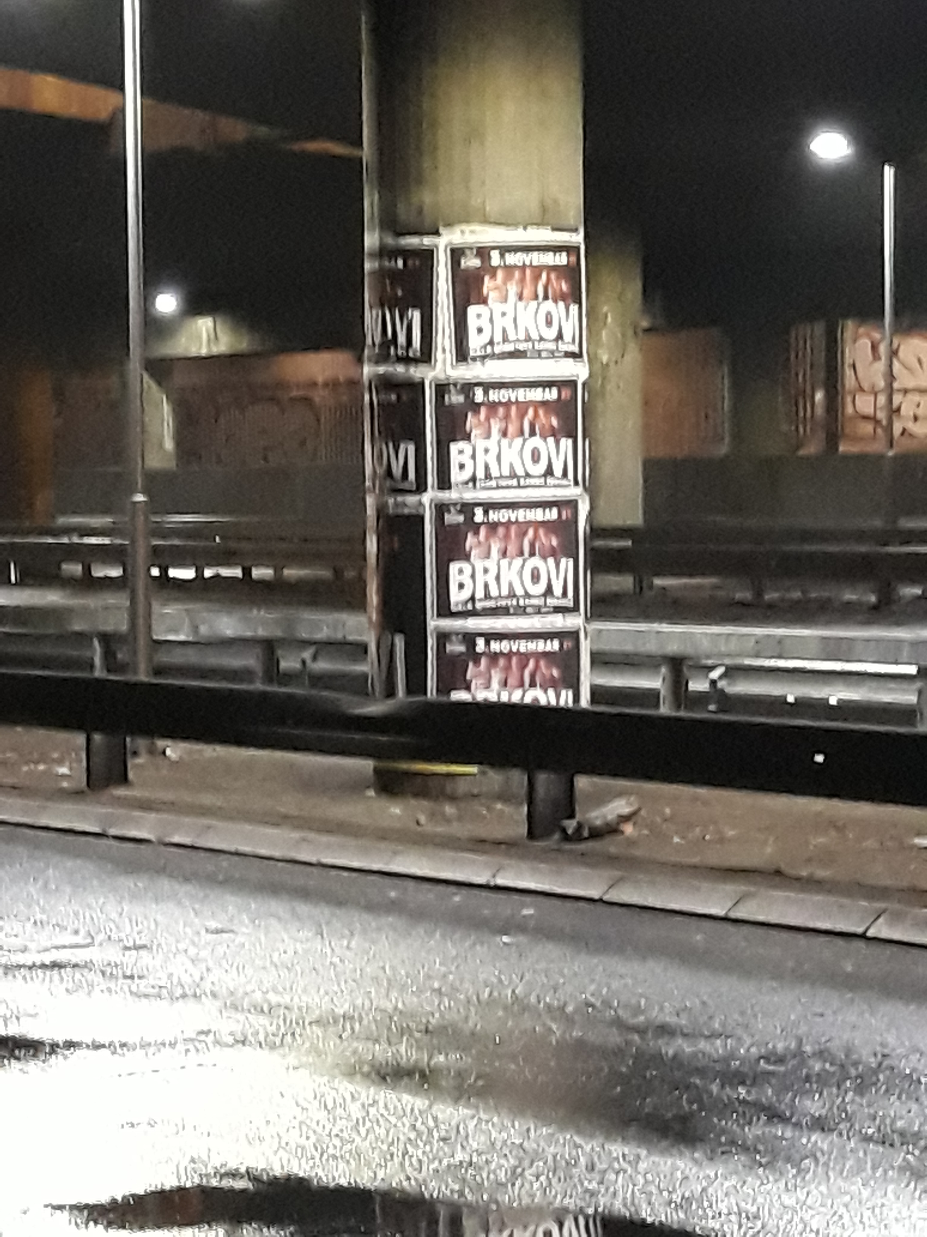 Најава београдског концерта групе Бркови, новембра 2018.